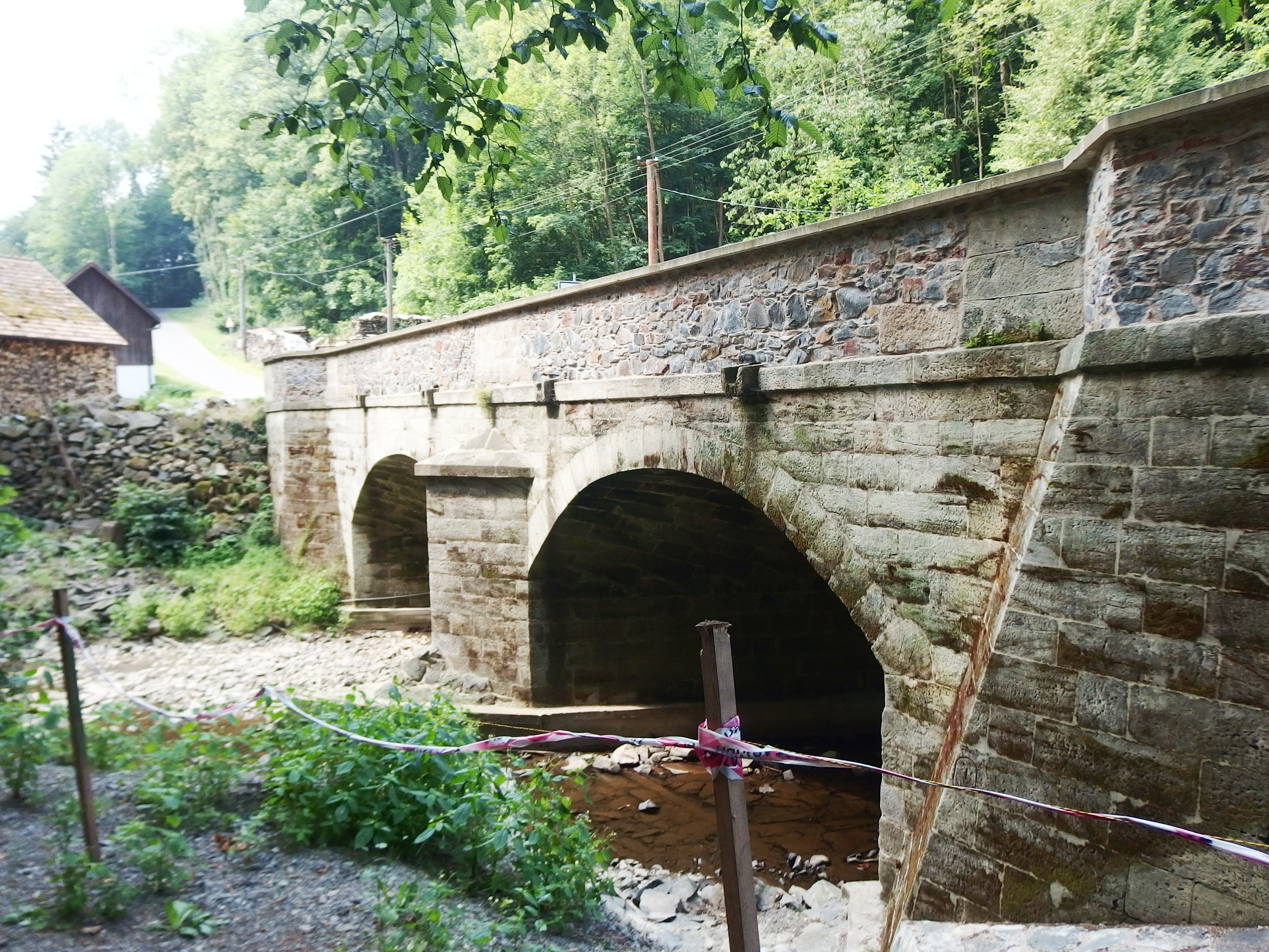 Silniční most přes řeku Krounku, Hněvětice. Za mostem začíná obec Předhradí, je od něj výhled na hrad Rychmburk, nyní zčásti zakrytý vegetací.